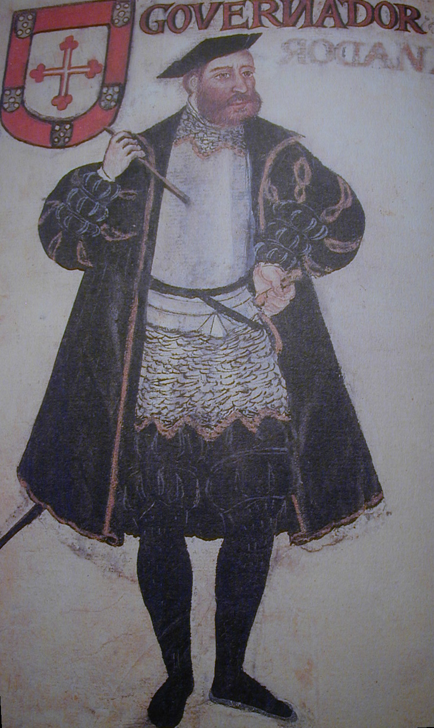 Lopo Soares de Albergaria Gouverneur de l'Inde portugaise